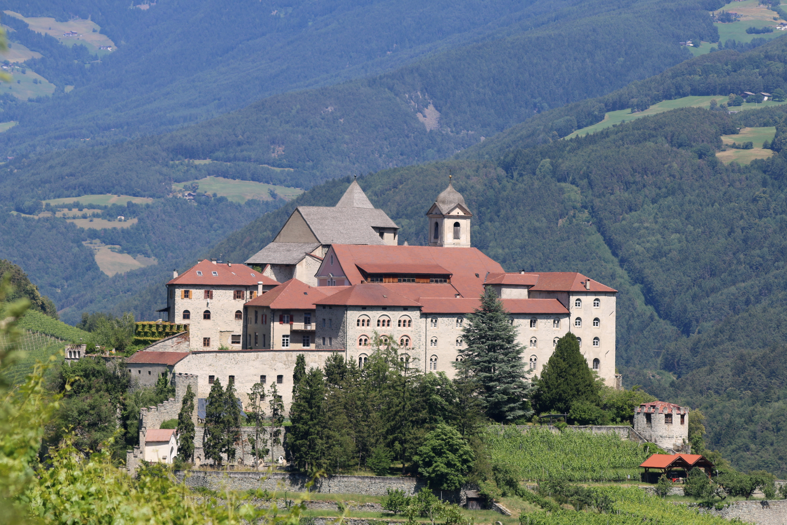 Klausen: Blick auf das Kloster Säben